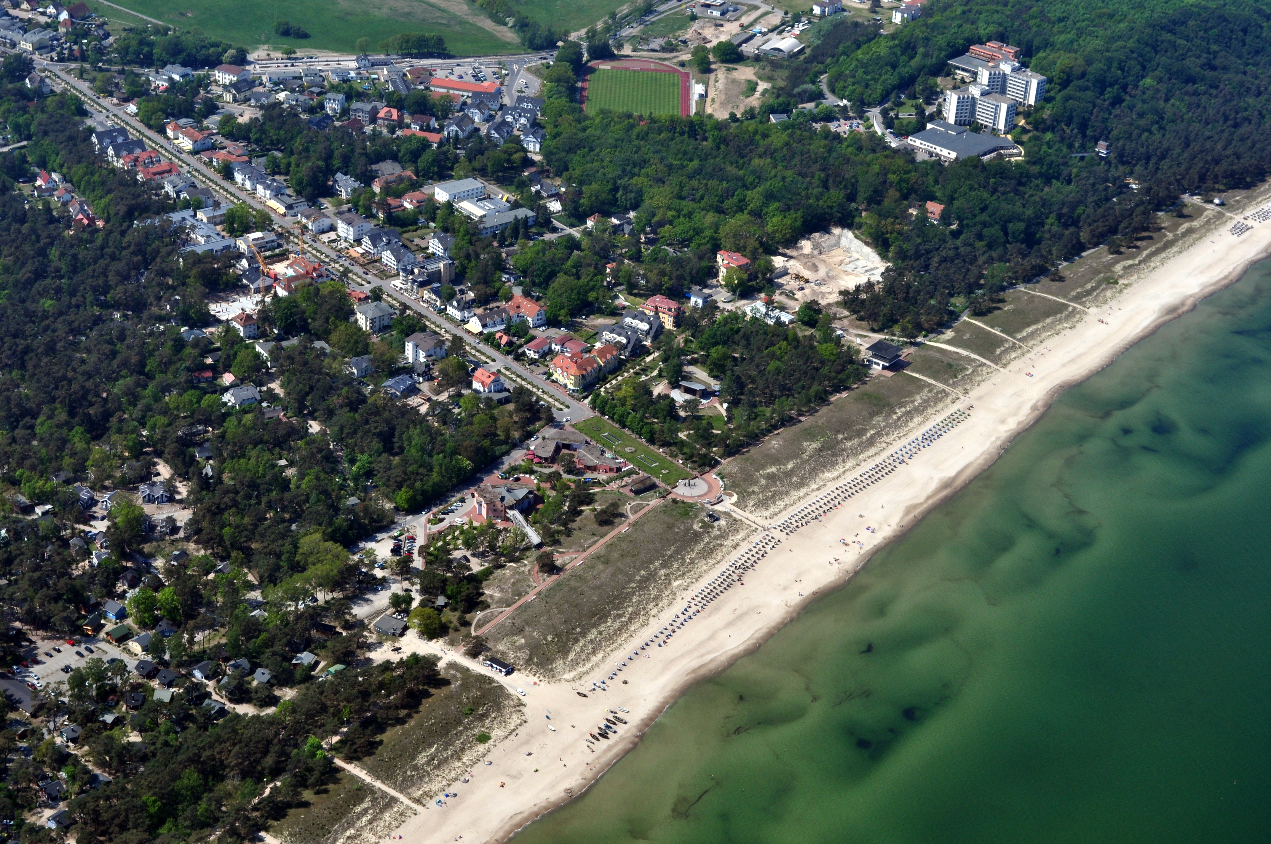 Die Bilder wurden von mir während eines einstündigen Rundflugs ab Flugplatz Güttin am 21. Mai 2011 aufgenommen. Die Bildbeschreibung steht im Dateinamen. Aufgenommen mit einer Nikon D5000 durch das Seitenfenster des Flugzeugs.